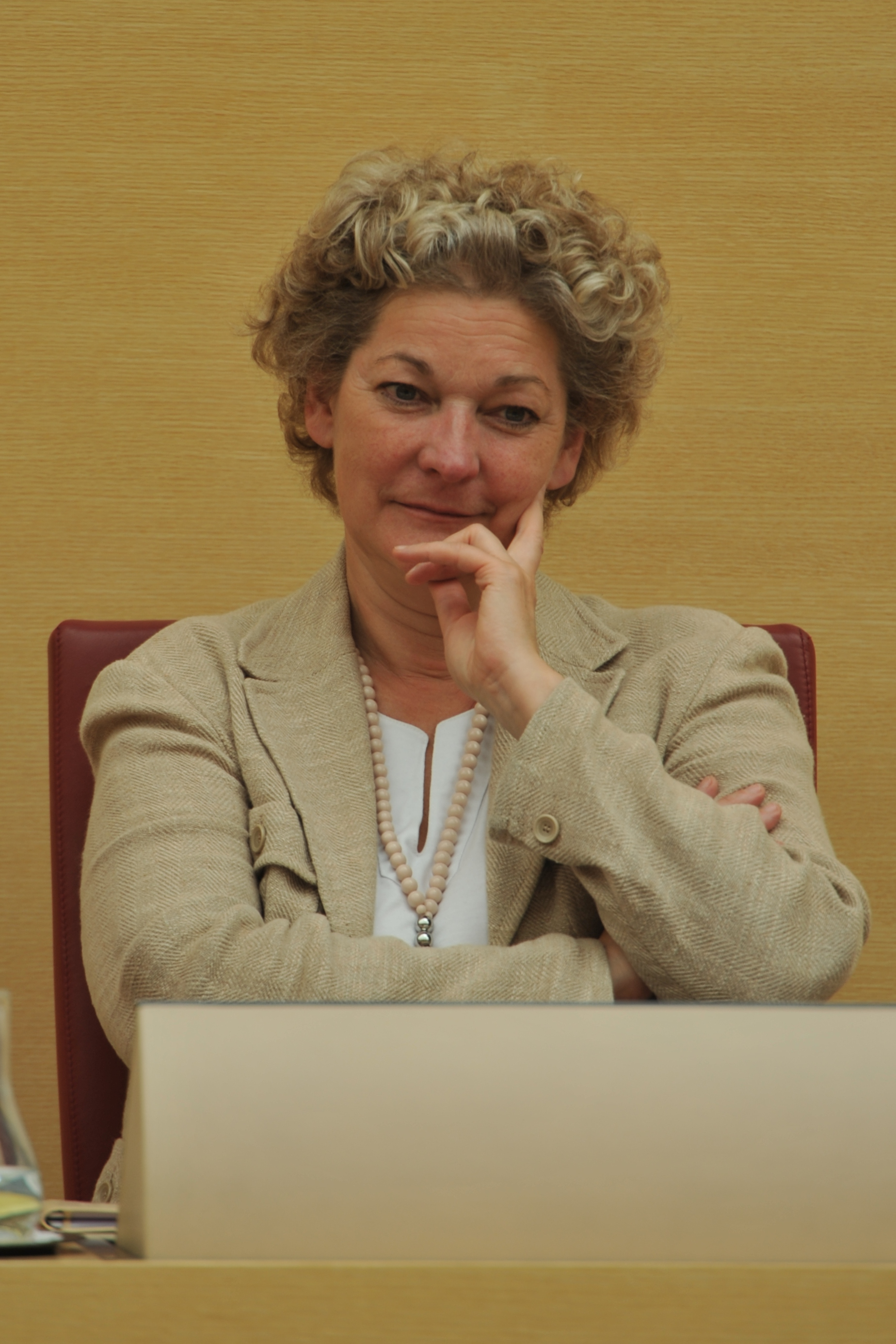 Landtagsprojekt Bayern The making of this work was supported by Wikimedia Austria. For other files made with the support of Wikimedia Austria, please see the category Supported by Wikimedia Österreich. Wikipedia im Landtag – Bayern 17. bis 19. Juli 2012 in MünchenDieses Foto wurde im Rahmen des Projektes „Wikipedia im Landtag“ erstellt.